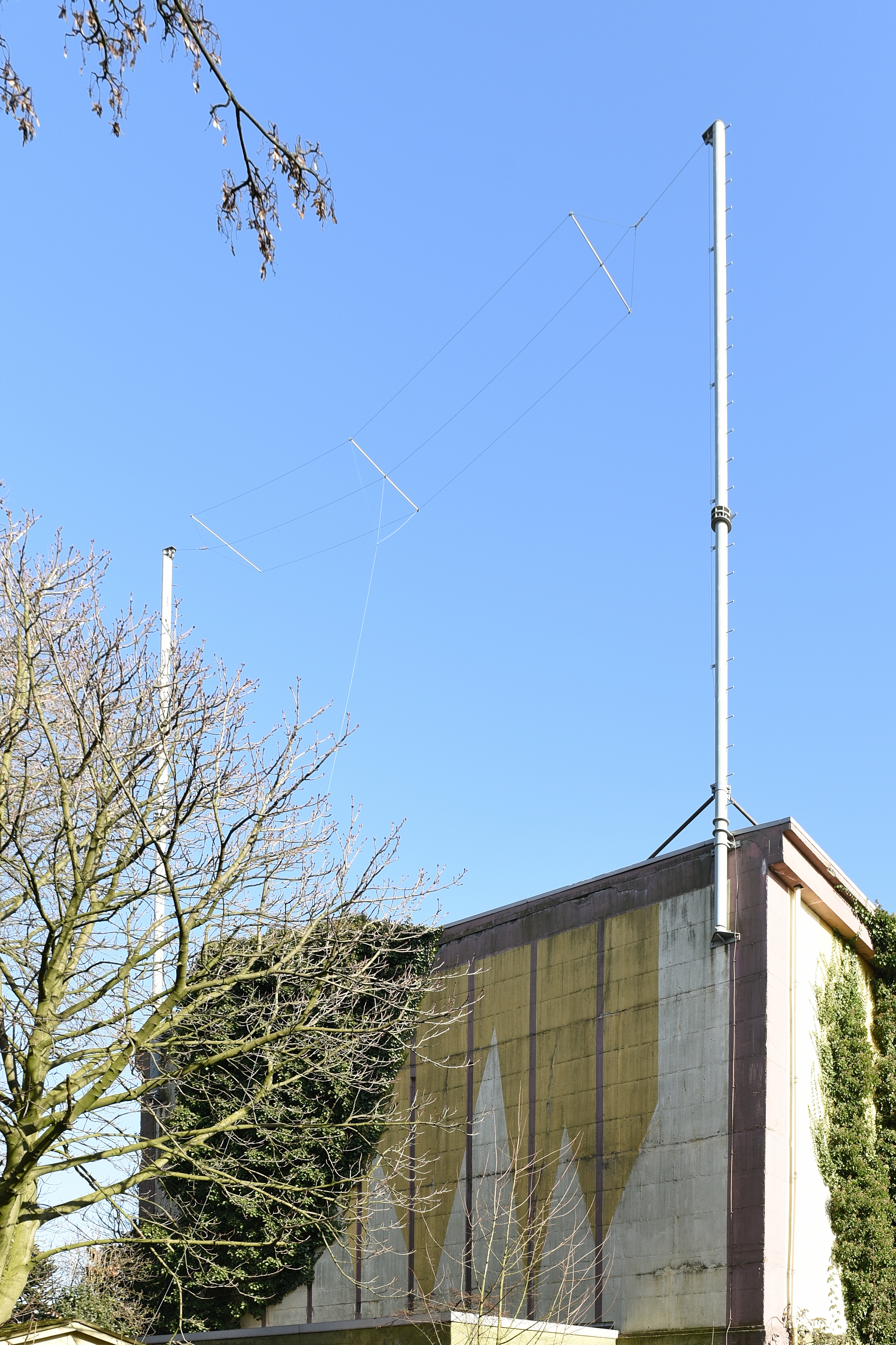 Ungerichtetes Funkfeuer BOT in Bottrop.